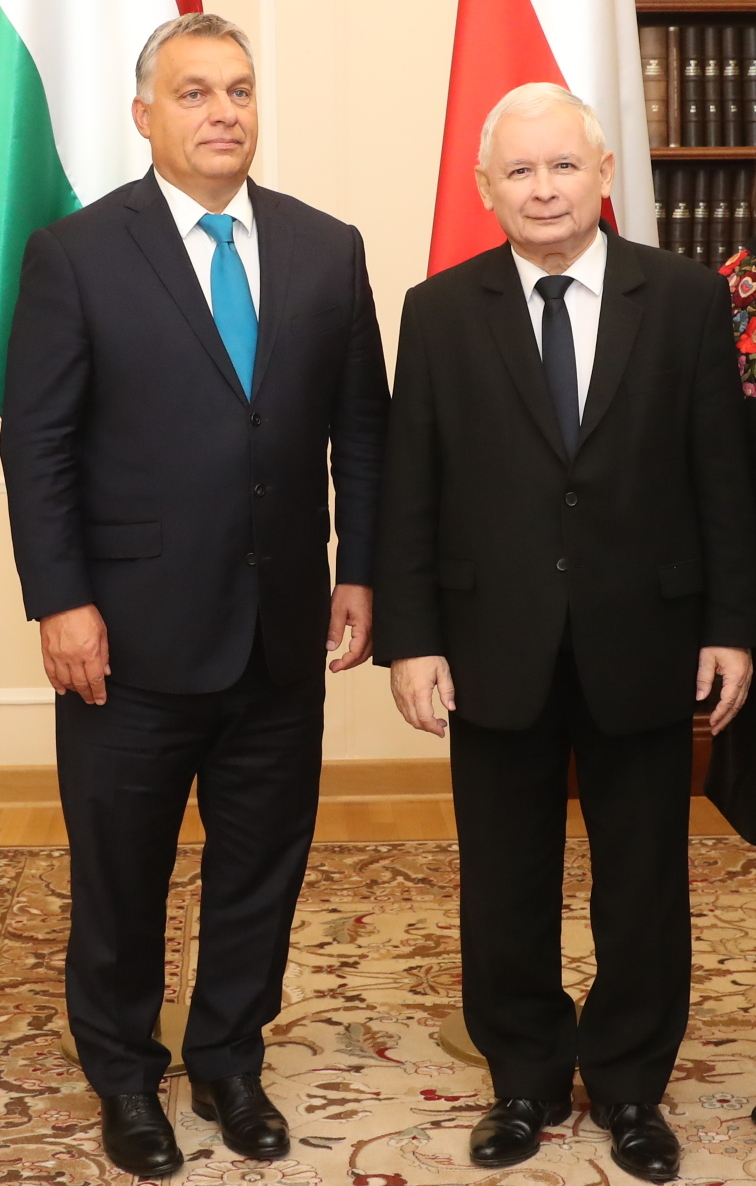 Jarosław Kaczyński i Viktor Orbán, ambasador Węgier Orsolya Zsuzsanna Kovács w Sejmie RP z marszałkami Sejmu. Viktor Orbán w Sejmie.